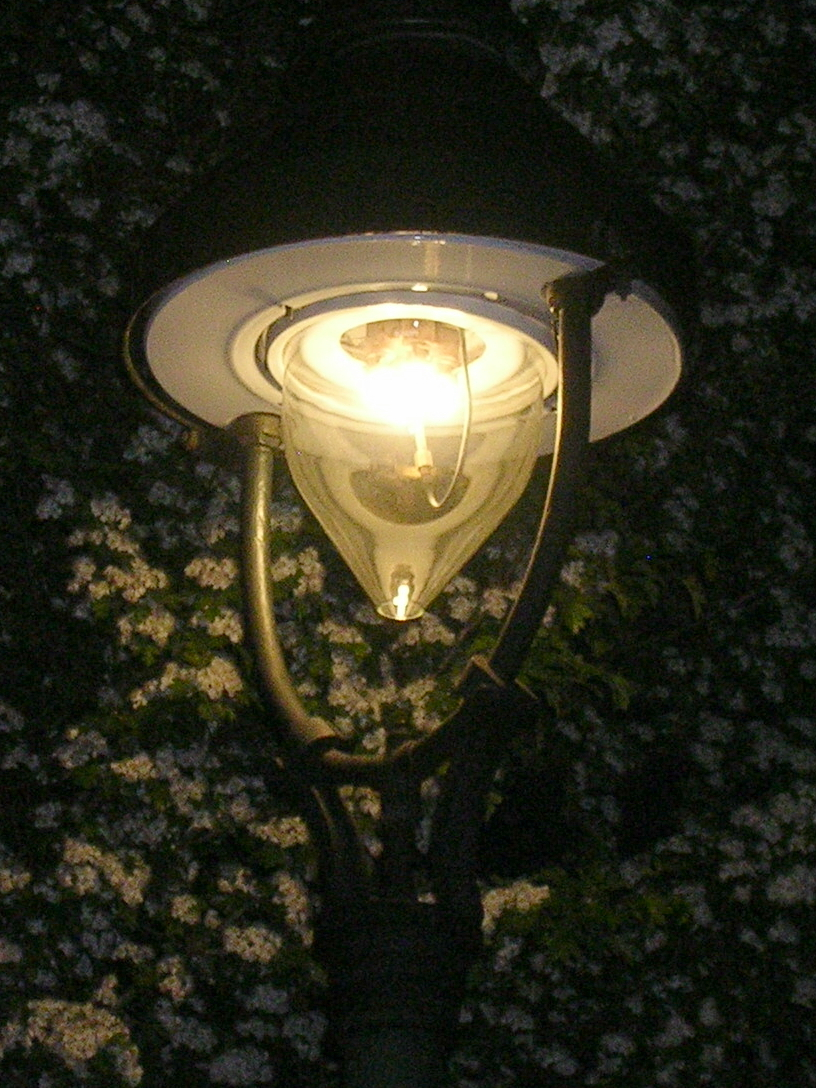 Gas-Aufsatzleuchte wie hier in Düsseldorf auf der Bueckstraße sorgen für Licht in zahlreichen Wohnstraßen der Stadt.